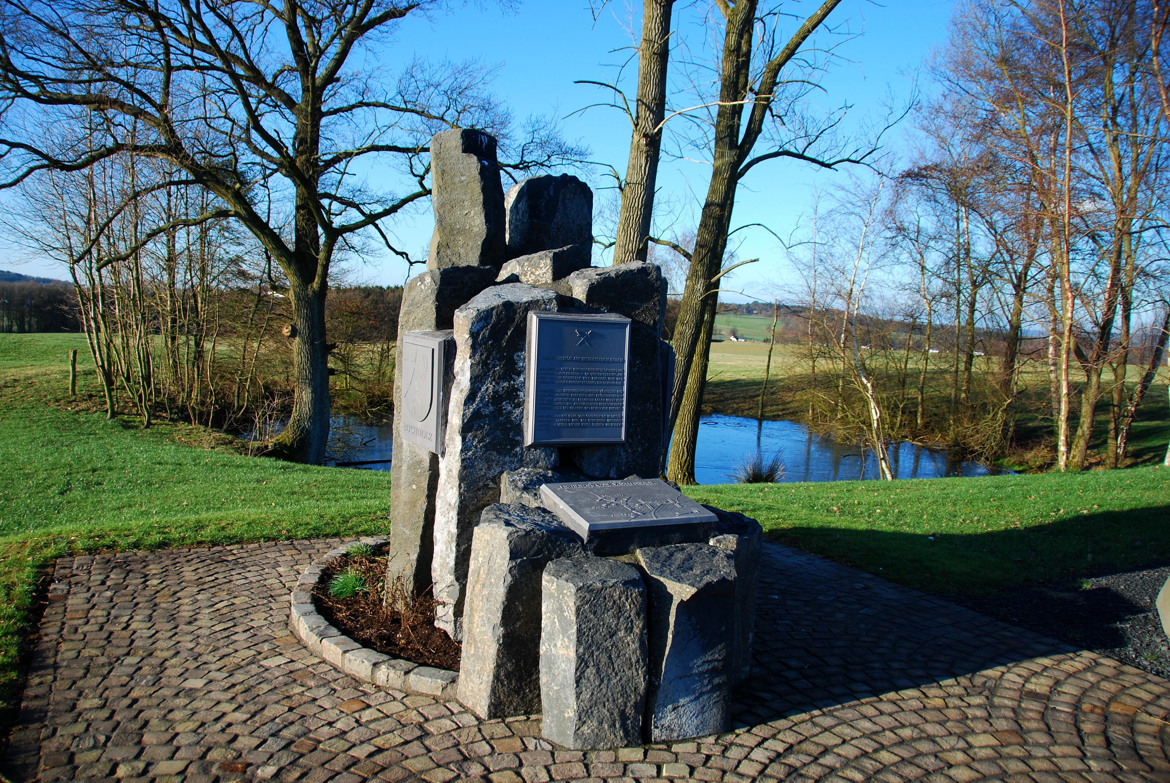 Zur Erinnerung an die Schlacht vom 19. Juni 1796